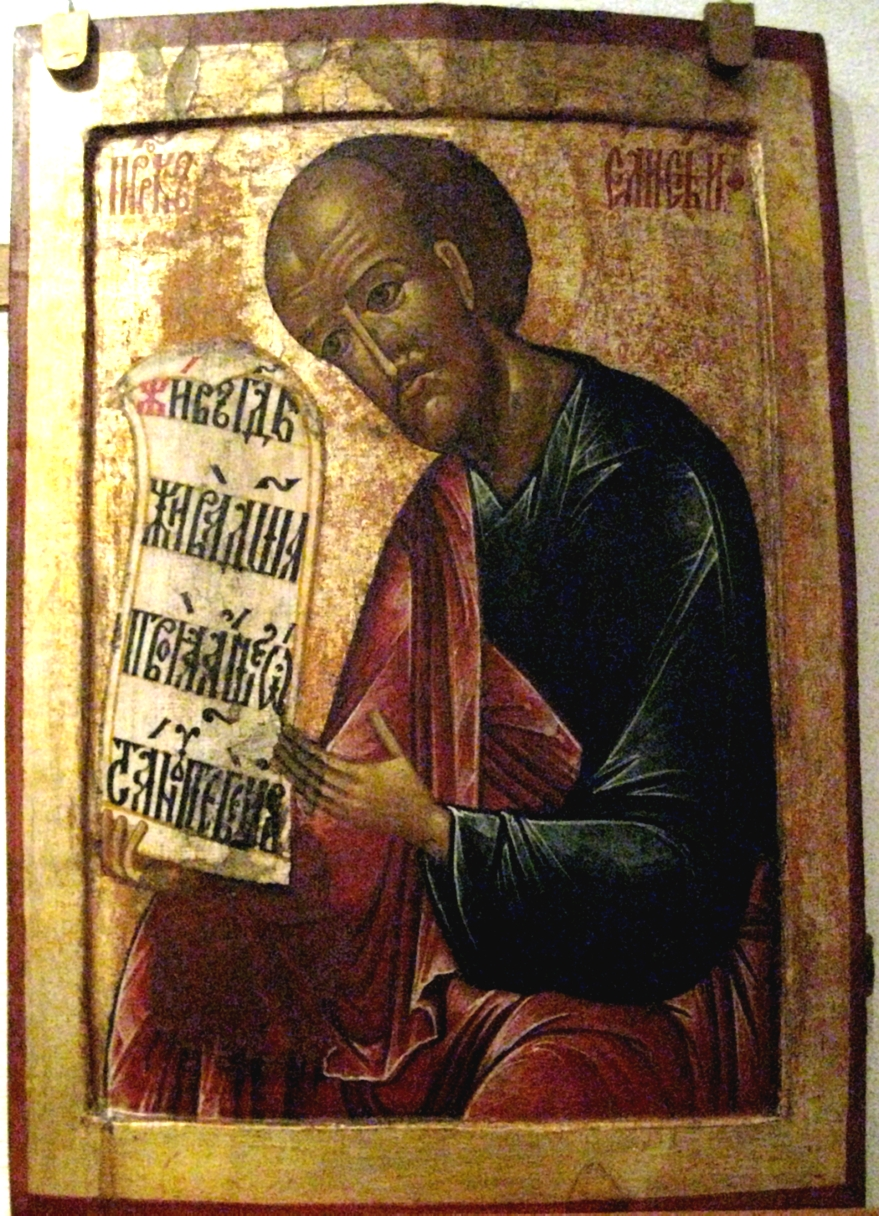 Пророк Иезекия. Иконописец Терентий Фомин (?) Вологда (уп. 1646–1670). Церковь Епифания Кипрского Кирилло-Белозерского монастыря